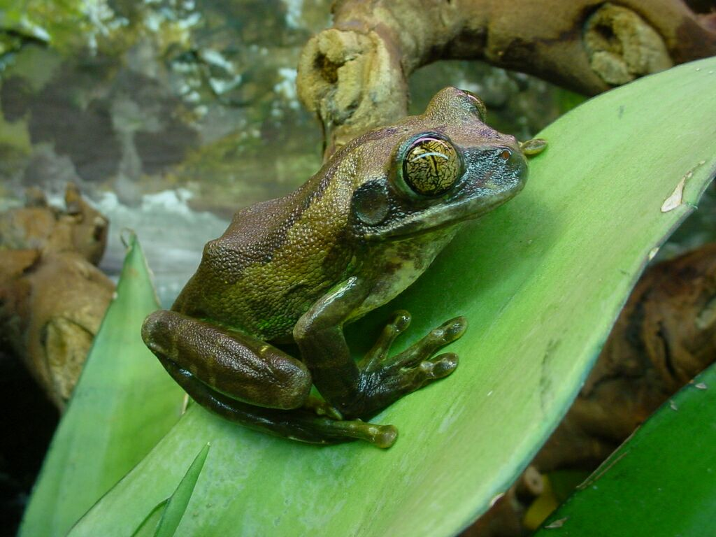 Grüner Waldsteigerfrosch, auch Juwelenlaubfrosch oder Blaufuß-Waldsteigerfrosch genannt (Leptopelis vermiculatus), weiblich, adult, Terrarienaufnahme.